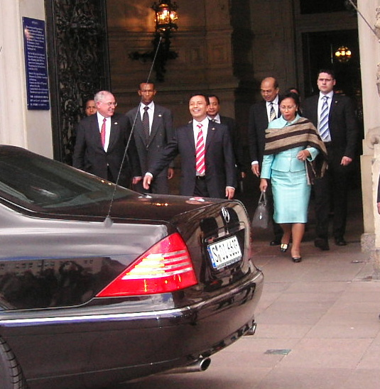 Der Präsident SE Mr Ravalomanana und Mrs Ravalomanana verlassen das Hamburger Rathaus